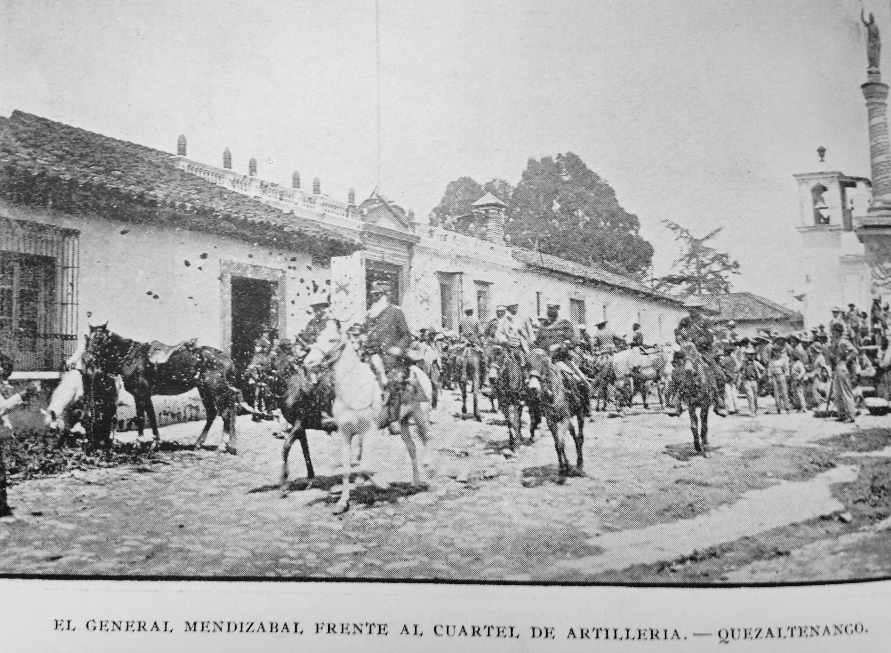 General Calixto Mendizábal, quien retomó Quetzaltenango para el gobierno del general José María Reina Barrios, pasando frente al cuartel de artillería.